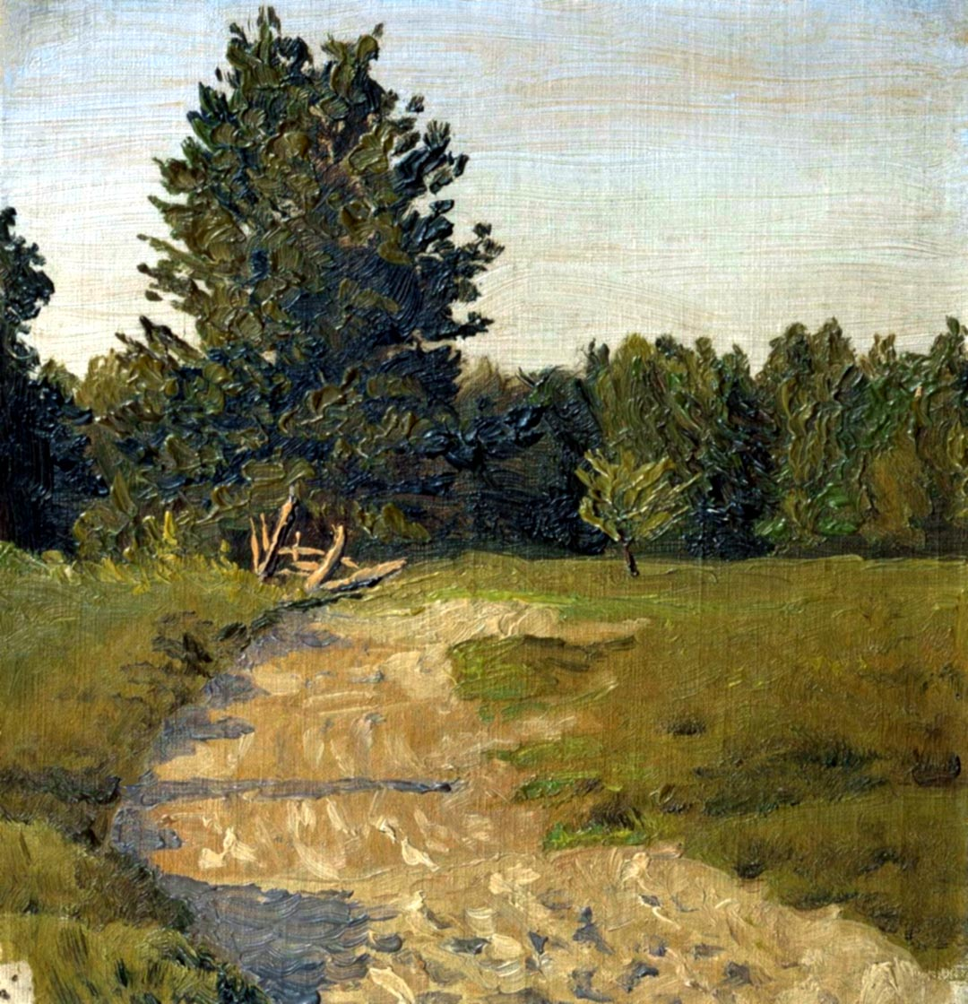 Екатерина Федоровна Юнге. Тригорское